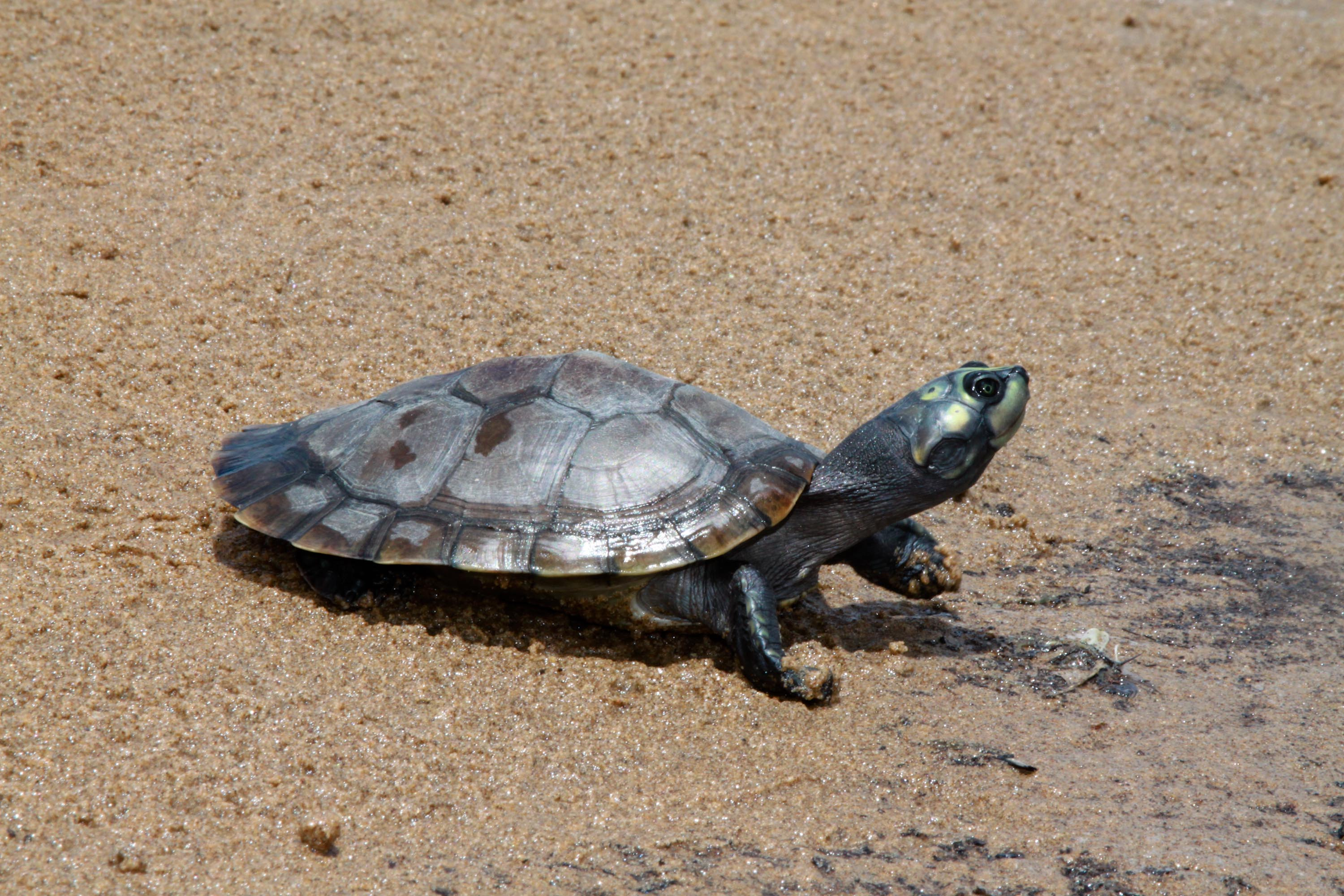 Tortuga Arrau (Podocnemis expansa)